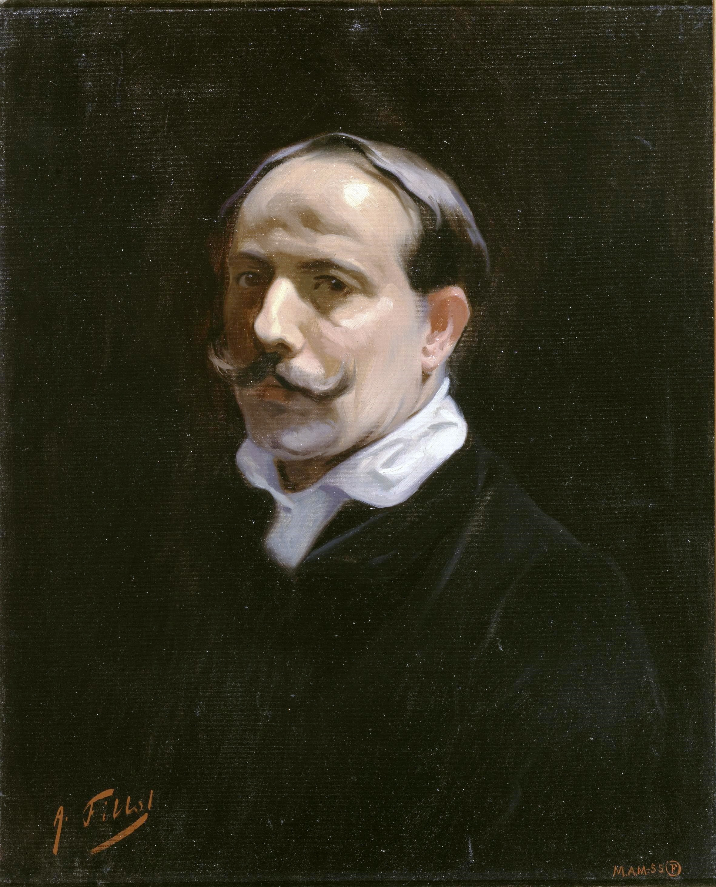 Autorretrato del pintor español Antonio Fillol Granell (1870-1930).